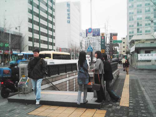 Anguk subway station, Seoul.